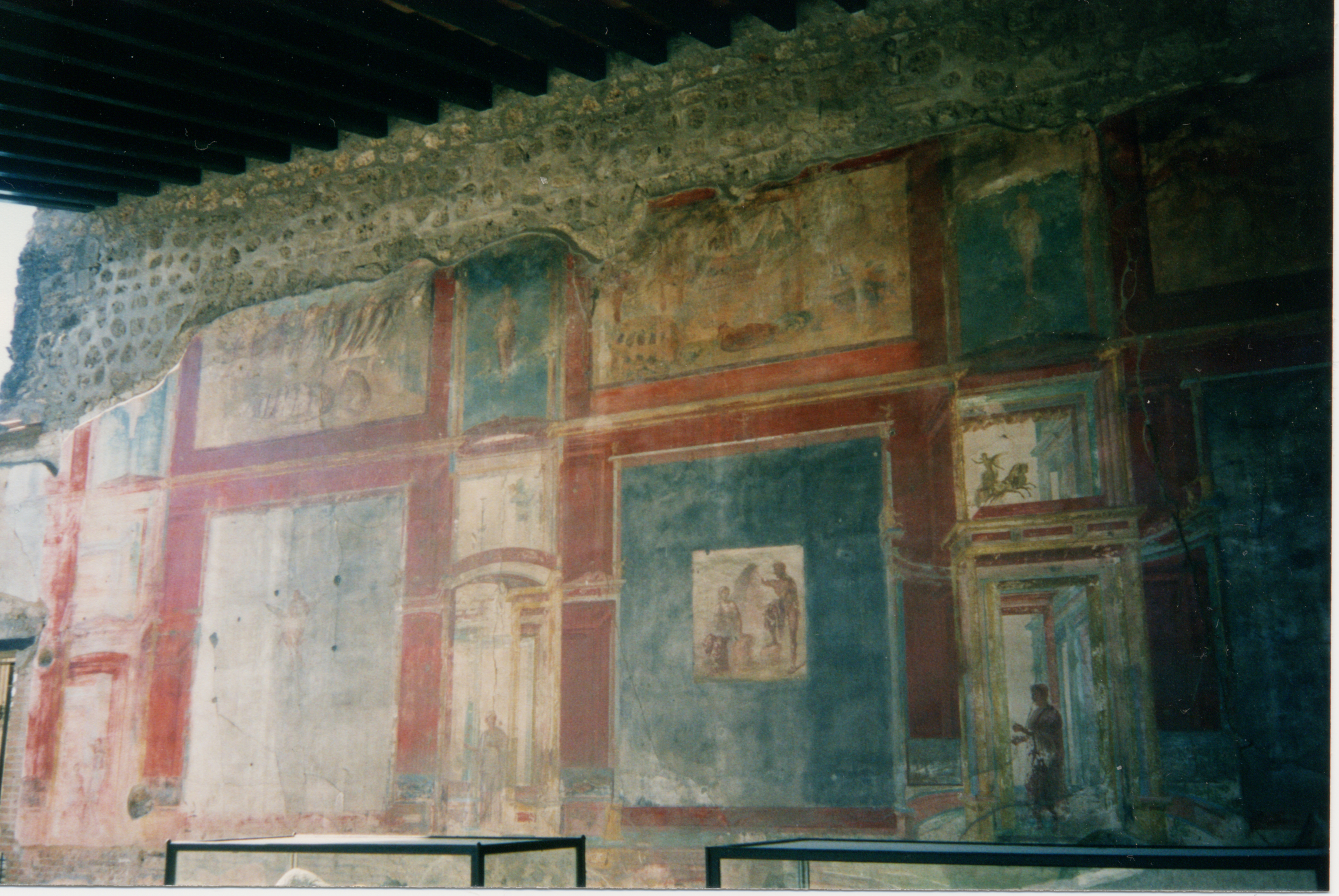 painting, Macellum in Pompeii, Italia